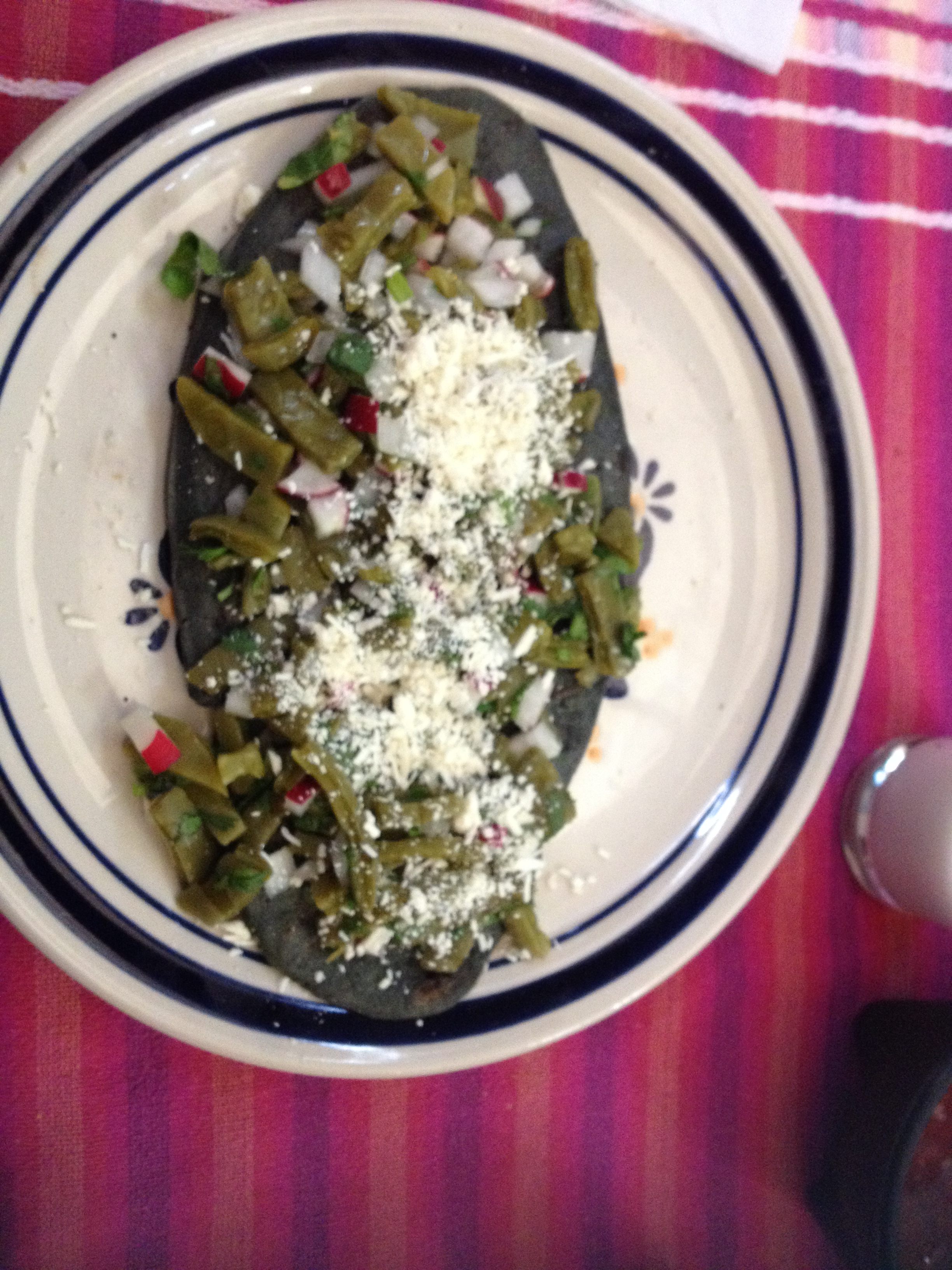 Tlacoyo, comida mexicana tradicional